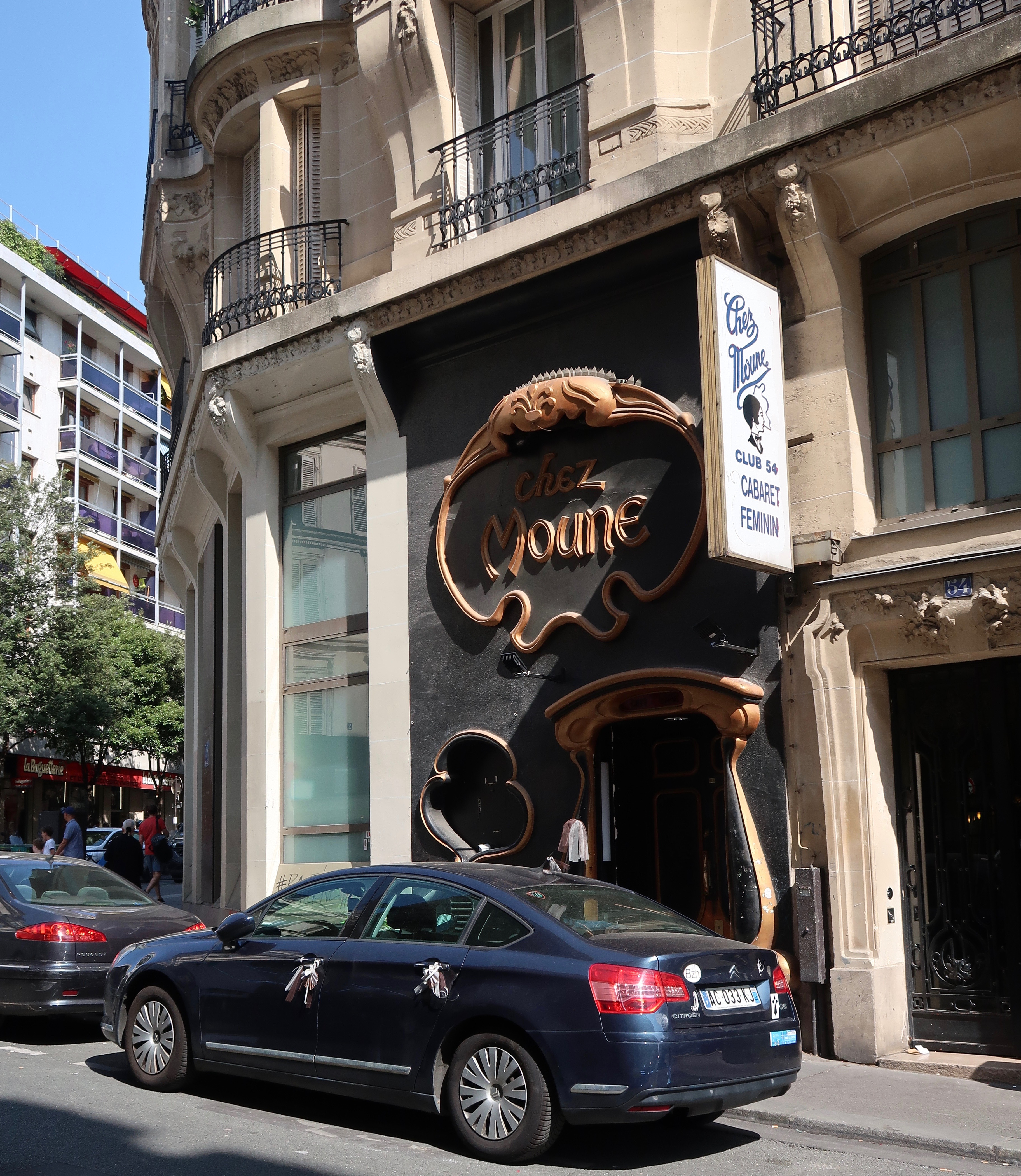 Chez Moune, 54 rue Jean-Baptiste-Pigalle (Paris, 9e).